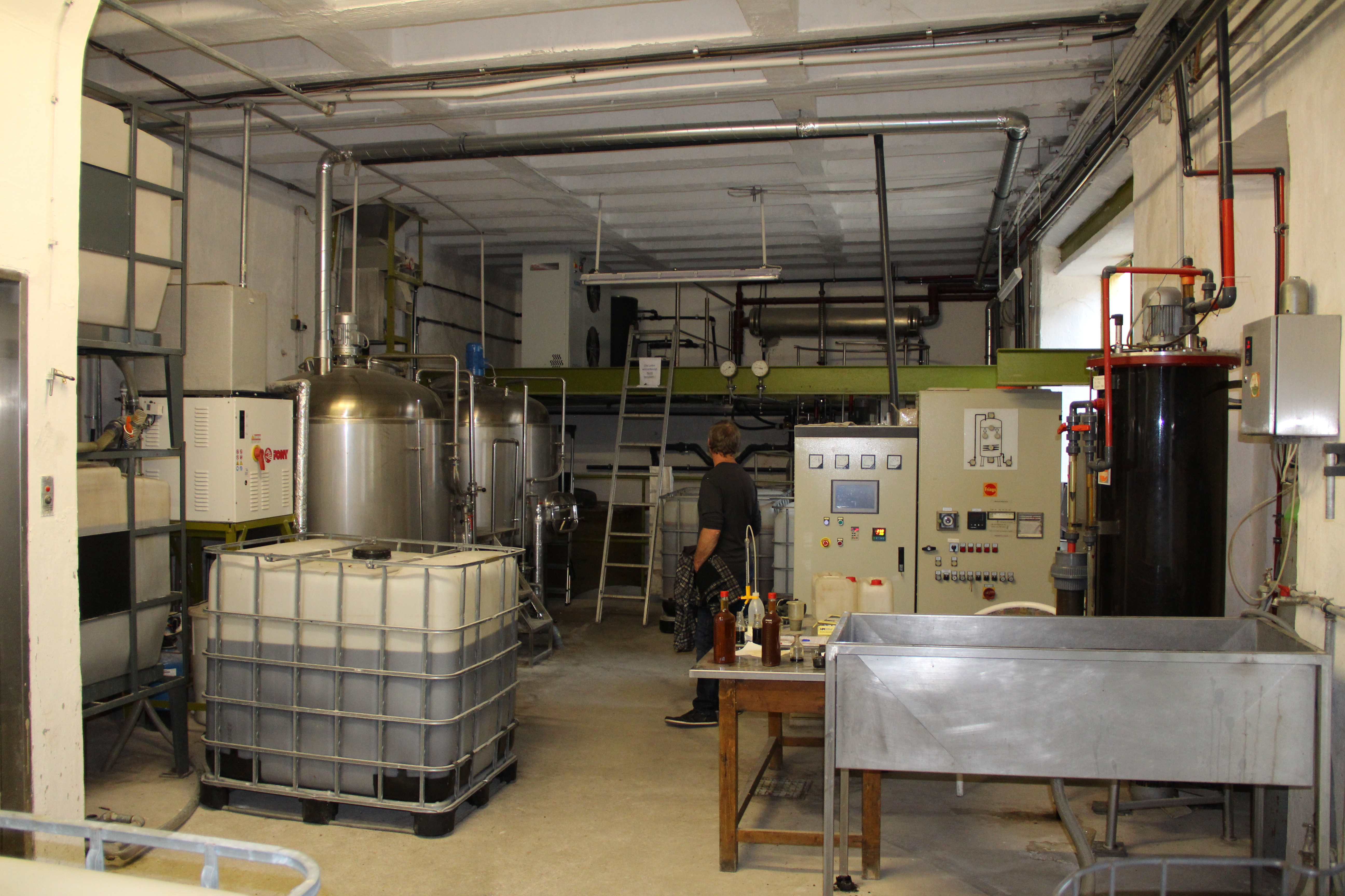 Zwei Edelstahl ACETATORen mit vollautomatisierter FRINGS (Rheinbach) Produktionstechnik. Wiener Essigbrauerei in der Waldgasse in Wien-Favoriten während OpenHouseWien 2015. Die Brauerei beherbergt neben einem Verkaufsladen im ersten Stock Hotelzimmmer.